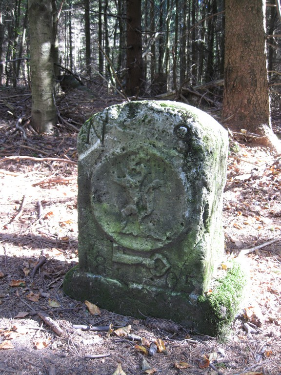 Schnadestein Grenze der Stadt Brilon zu Hessen-Waldeck mit dem Löwen von Hessen-Darmstadt